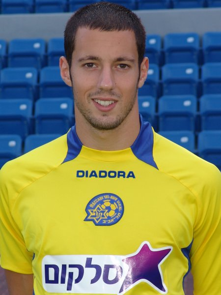 עומר פרץ, שחקן מכבי תל אביב (Omer Peretz of Maccabi Tel Aviv)